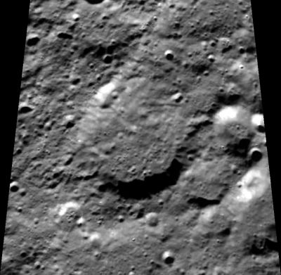 石申环形山照片